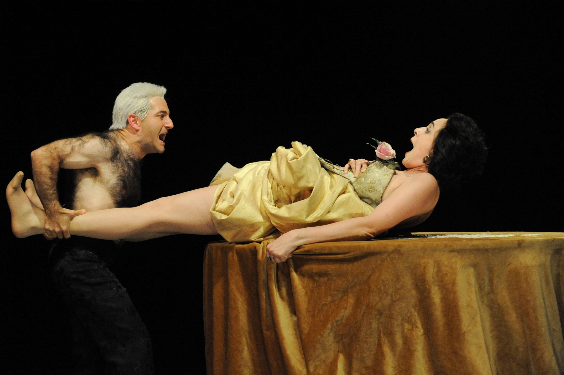 נטע שפיגלמן בטרטיף